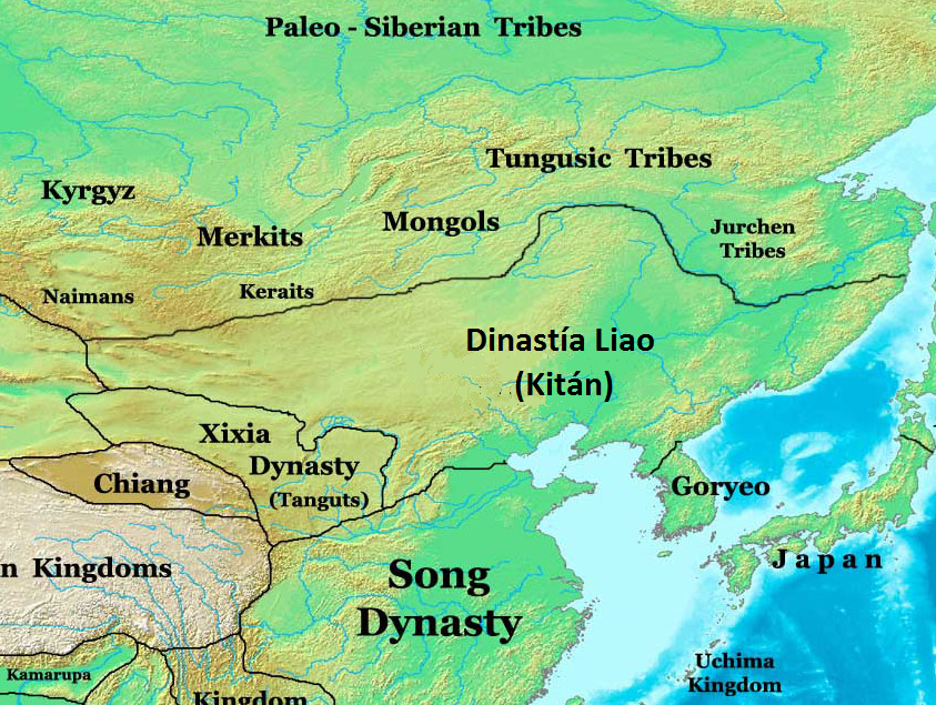 Extensión de la dinastía Liao (Kitán) en el año 1025 DC